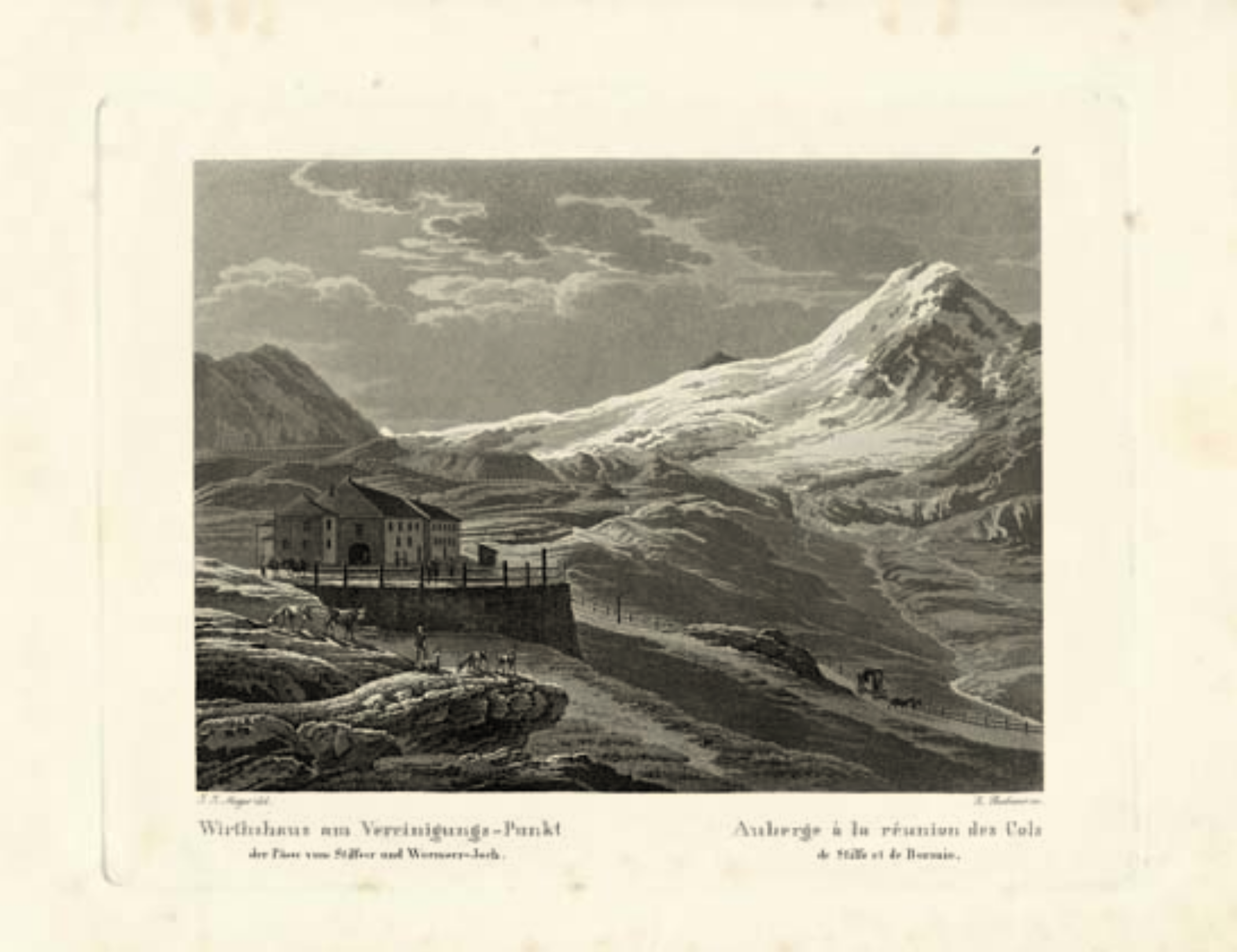 Albergo alla confluenza tra il Passo dello Stelvio e il Passo di Bormio di Johann Jakob Meyer. Opera del 1831. Dimensioni 143+201 cm. Tecnica Acquaforte e acquatinta. Stile Romanticismo. Dall’album Mahlerische Reise auf der neuen Kunst-Strasse aus dem Etschthal in Tyrol über das Stilfser-Joch durch das Veltlin längs dem Comersee nach Mayland (Viaggio pittoresco sulla nuova strada dalla valle dell’Adige in Tirolo attraverso il Passo dello Stelvio e la Valtellina, lungo il lago di Como fino a Milano), Zurigo, 1831, tav. 8.